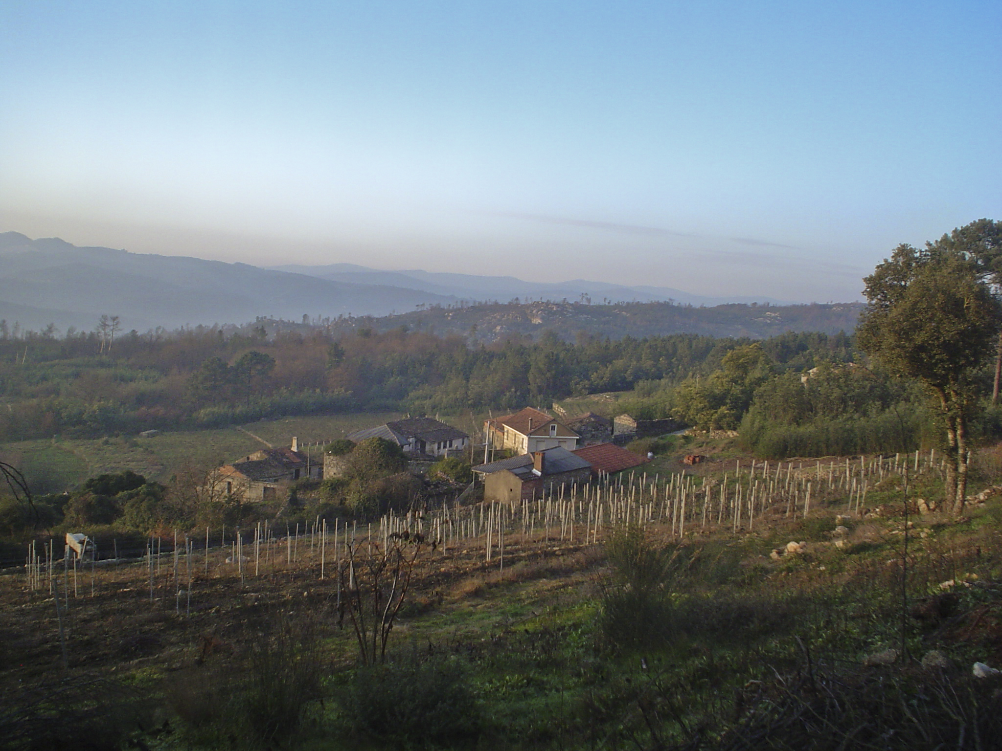 Atardecer en Názara (Cenlle)